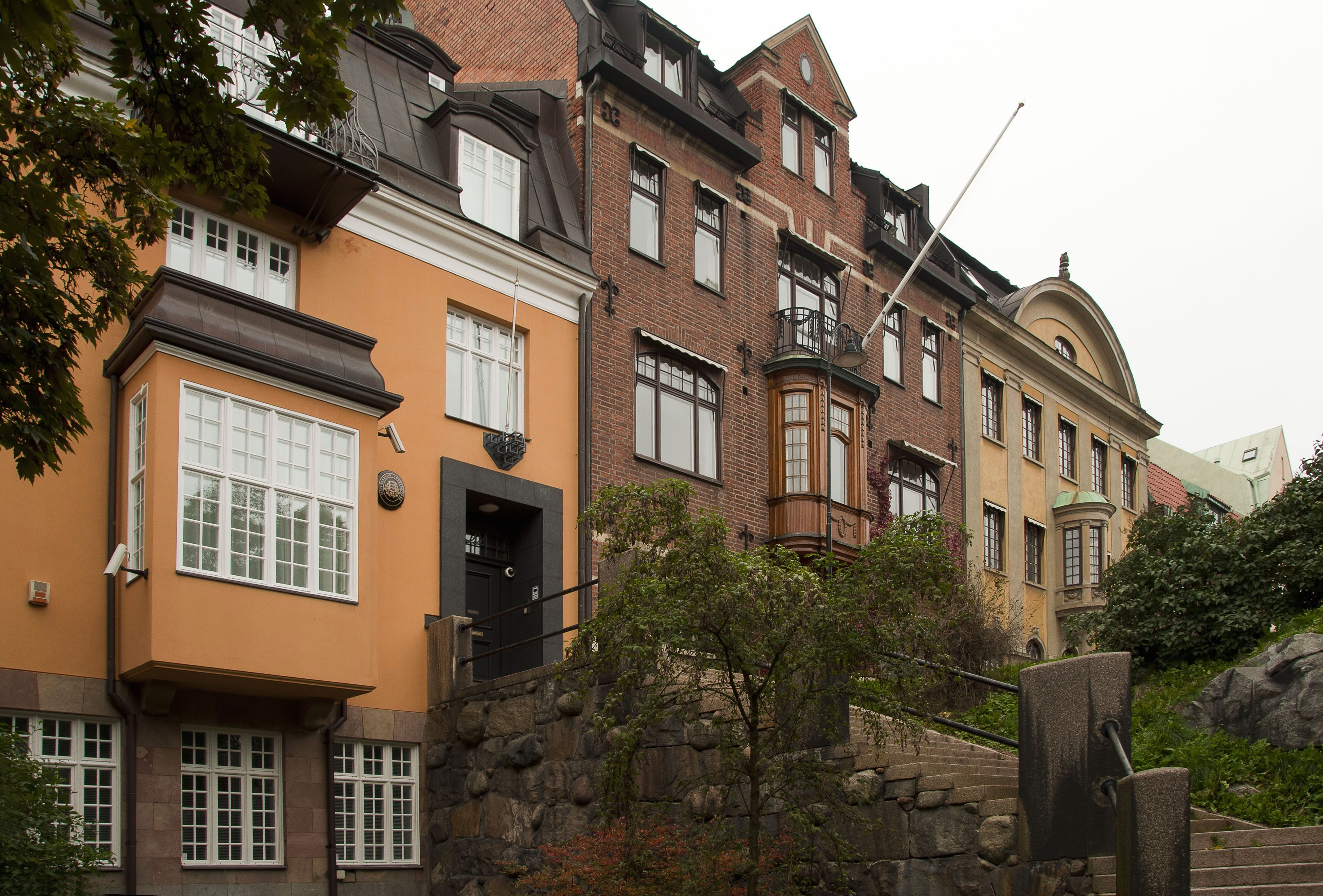 Tyrgatan 3-7, Stockholm. Från vänster; Tyrgatan 3 (Tofslärkan 14): Byggnadsår 1910-12, arkitekt N Lovén, byggherre och byggmästare Alb Andersson. Tyrgatan 5 (Tofslärkan 13): Byggnadsår 1909-10, arkitekt E Josephson, byggherre G Jacobsson, byggmästare A Nordström. Tyrgatan 7 (Tofslärkan 12): Byggnadsår 1910, arkitekt E O Ulrich, byggherre C J U1rich, byggmästare E Öfverberg.